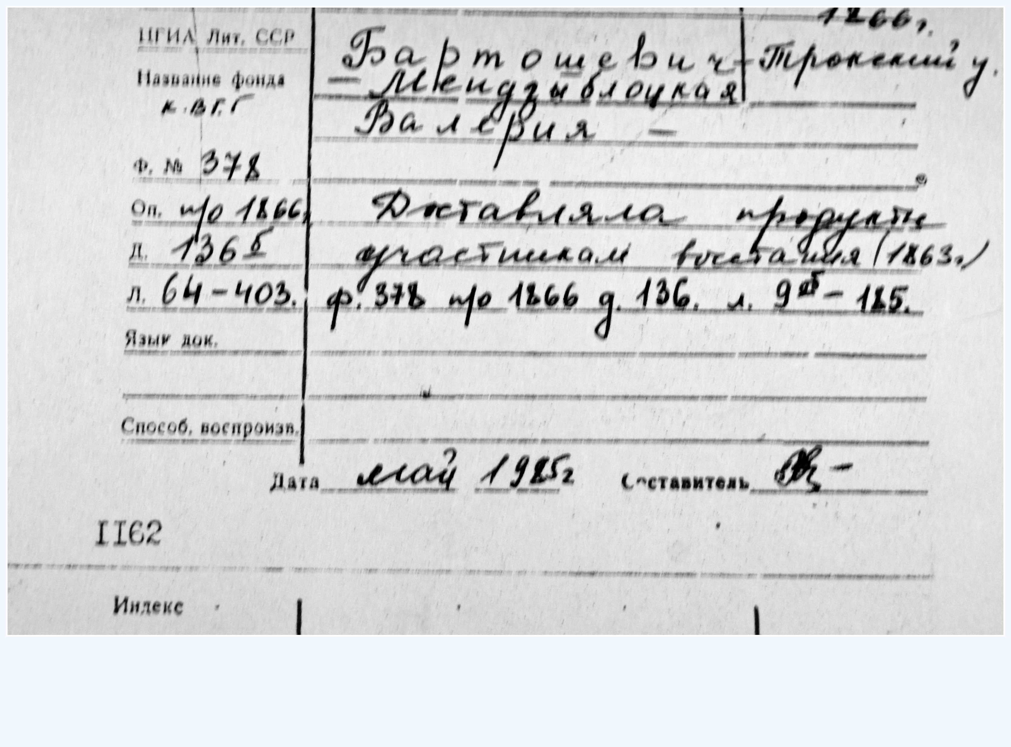 Valerijos Bartuševičiūtės Medziblockos 1863 m. sukilimo kortelė, t.y. sukilimo dalyvės.